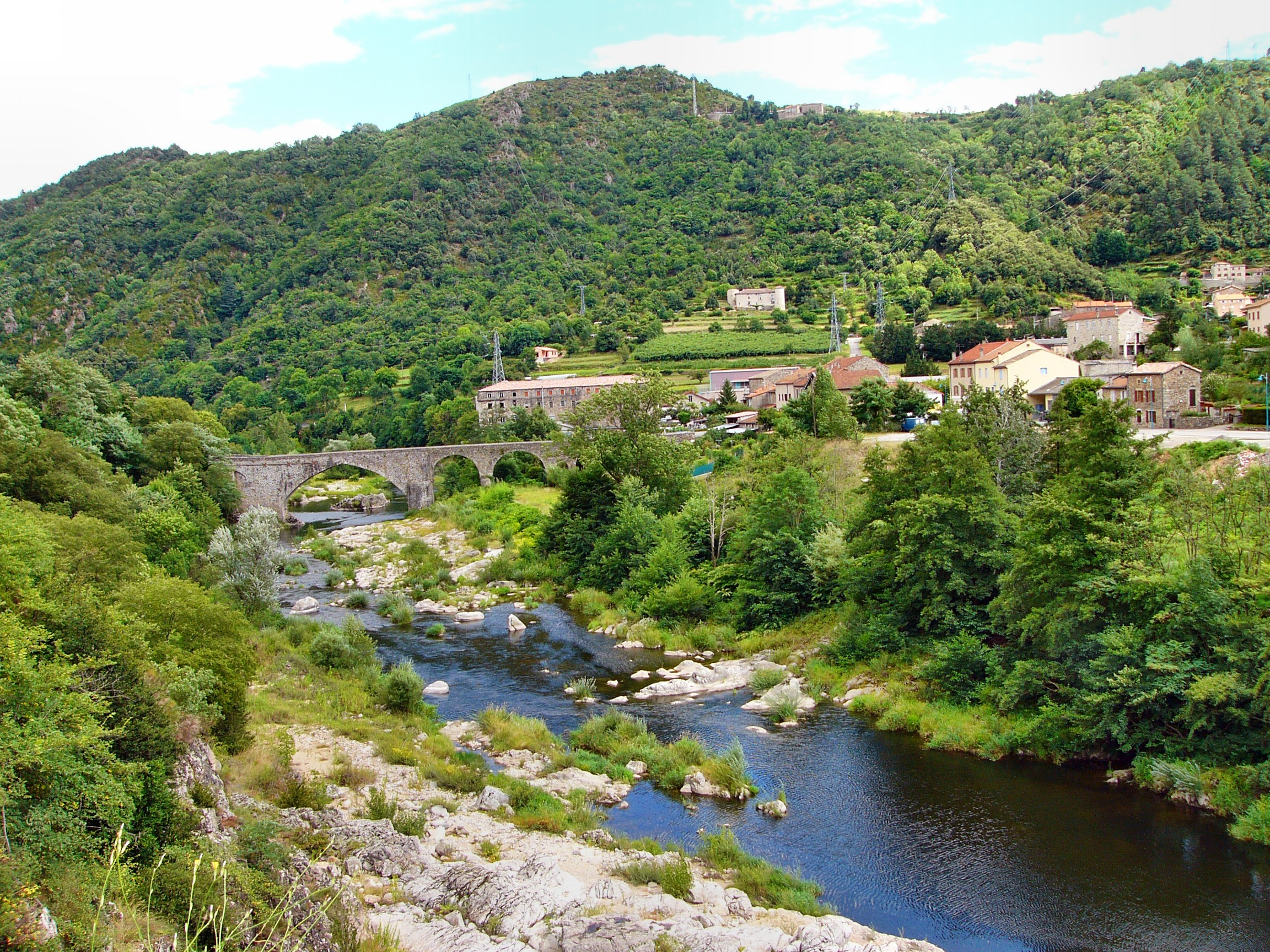 Le Moulinon et son vieux pont de pierre. Commune de Saint-Sauveur-de-Montagut